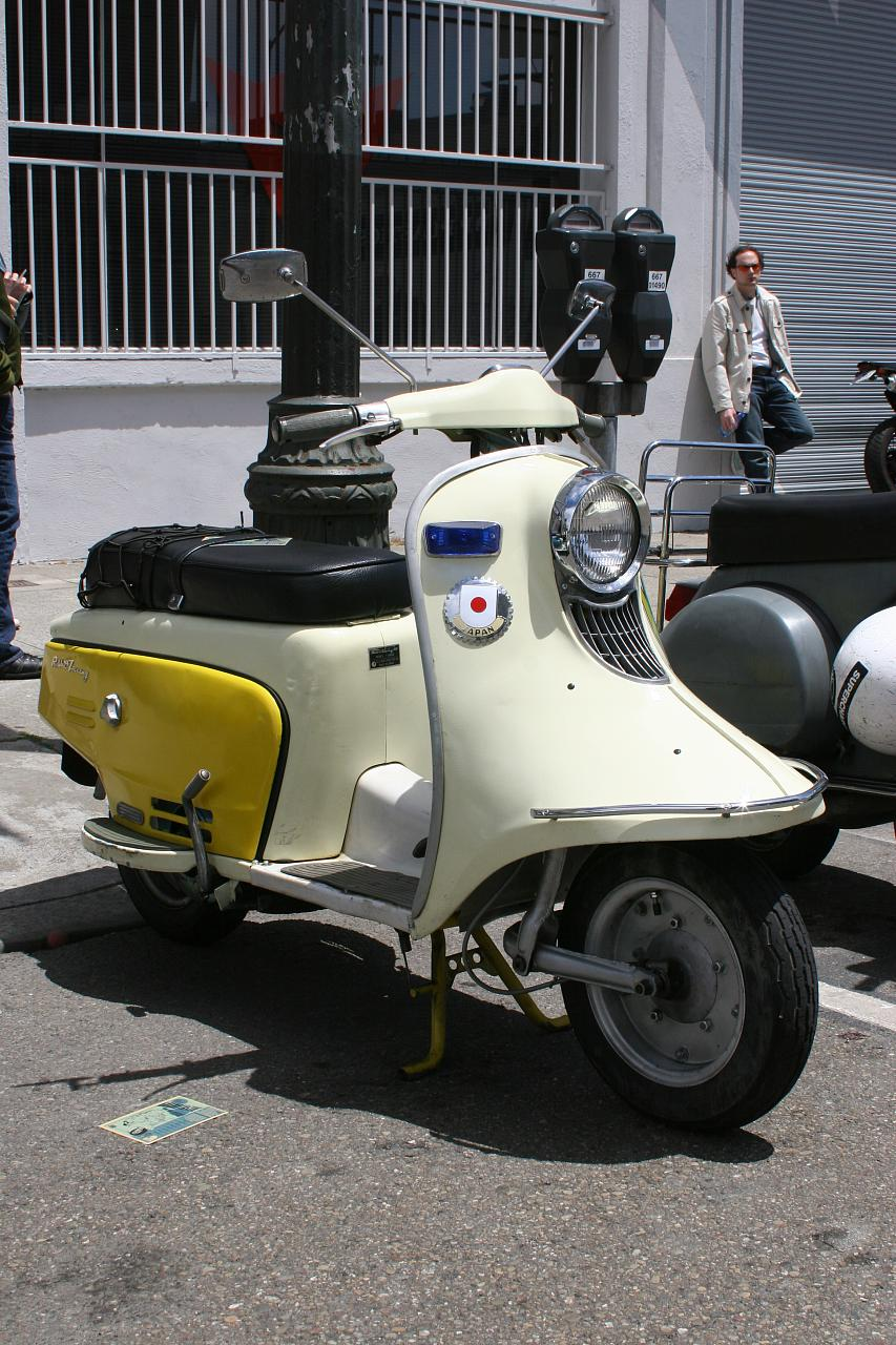 Fuji Touring 150 - Side View